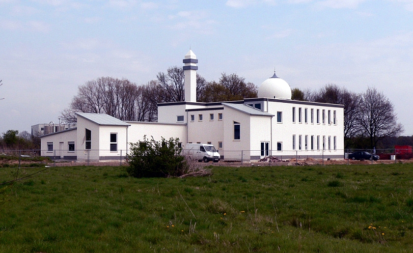 Bait us-Sami in Hannover, Schwarze Heide (Original text: Moscheebau in der Siedlung Schwarze Heide